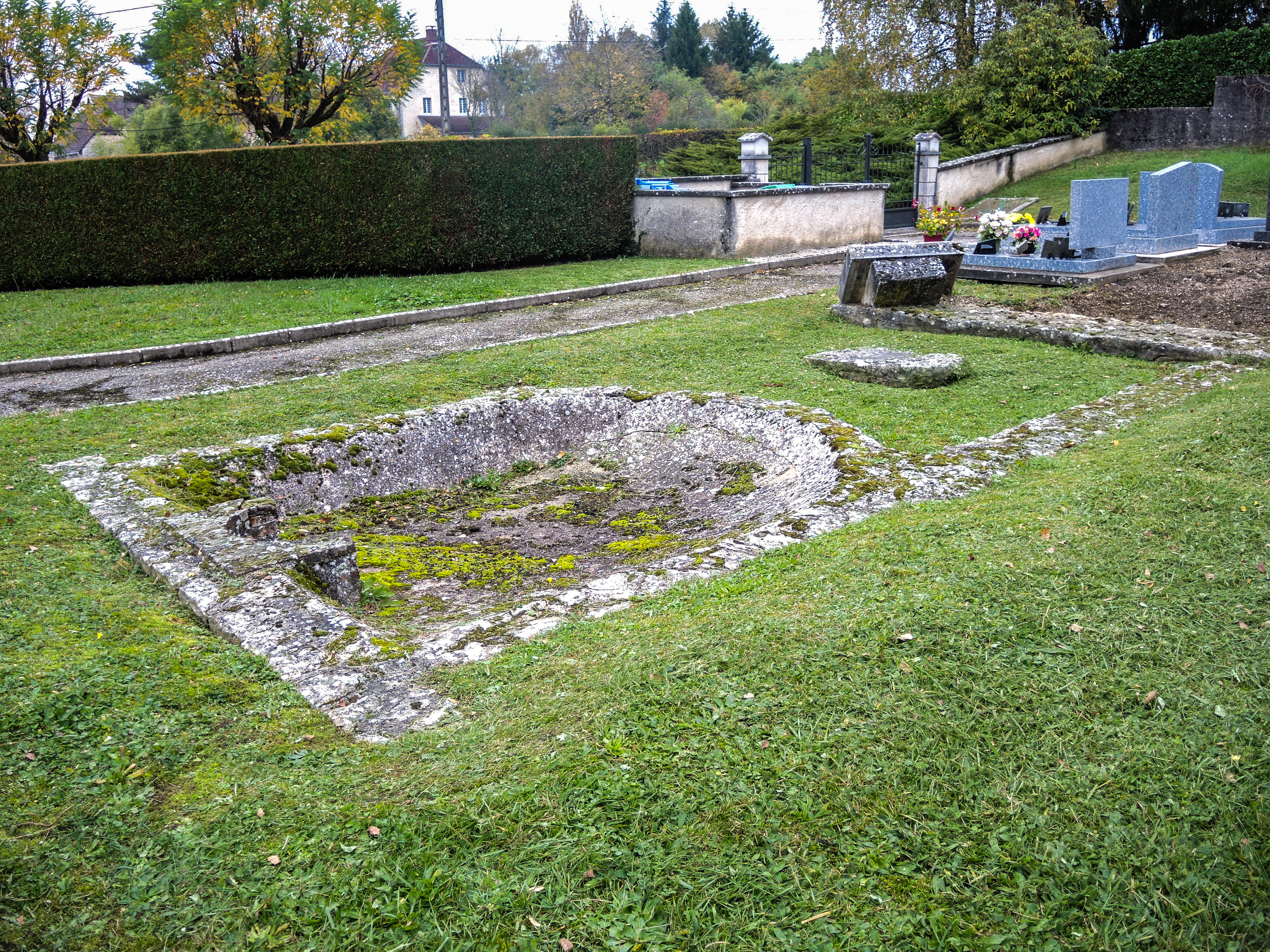 Bassin de la villa Romaine de Goux. Jura.